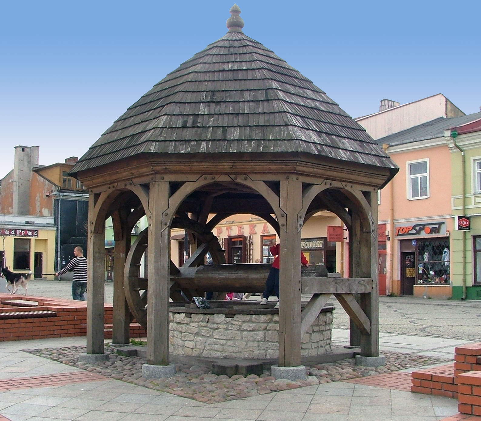 Studnia dolnego zamku (XIII, XIX) w zespole katedry greckokatolickiej „Górka Katedralna” na Placu Łuczkowskiego w Chełmie